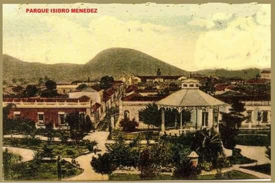 Litografía pintada a mano en la que se muestra a la ciudad salvadoreña de Santa Ana, vista desde el campanario de la iglesia El Calvario en la década de 1880s.